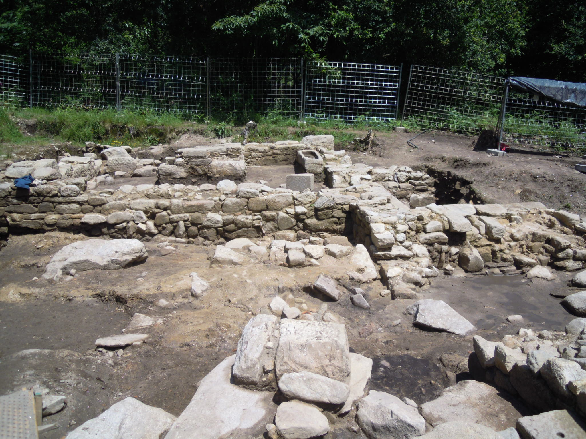 Vista desde o sur da escavación arqueolóxica da igrexa vella de Santa Comba de Louro. Á fronte, sartego e altar na capela de construción moderna.